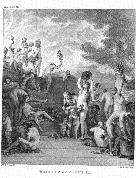 Жан-Батист Лепренс. Общественная баня. 1760-е гг. России